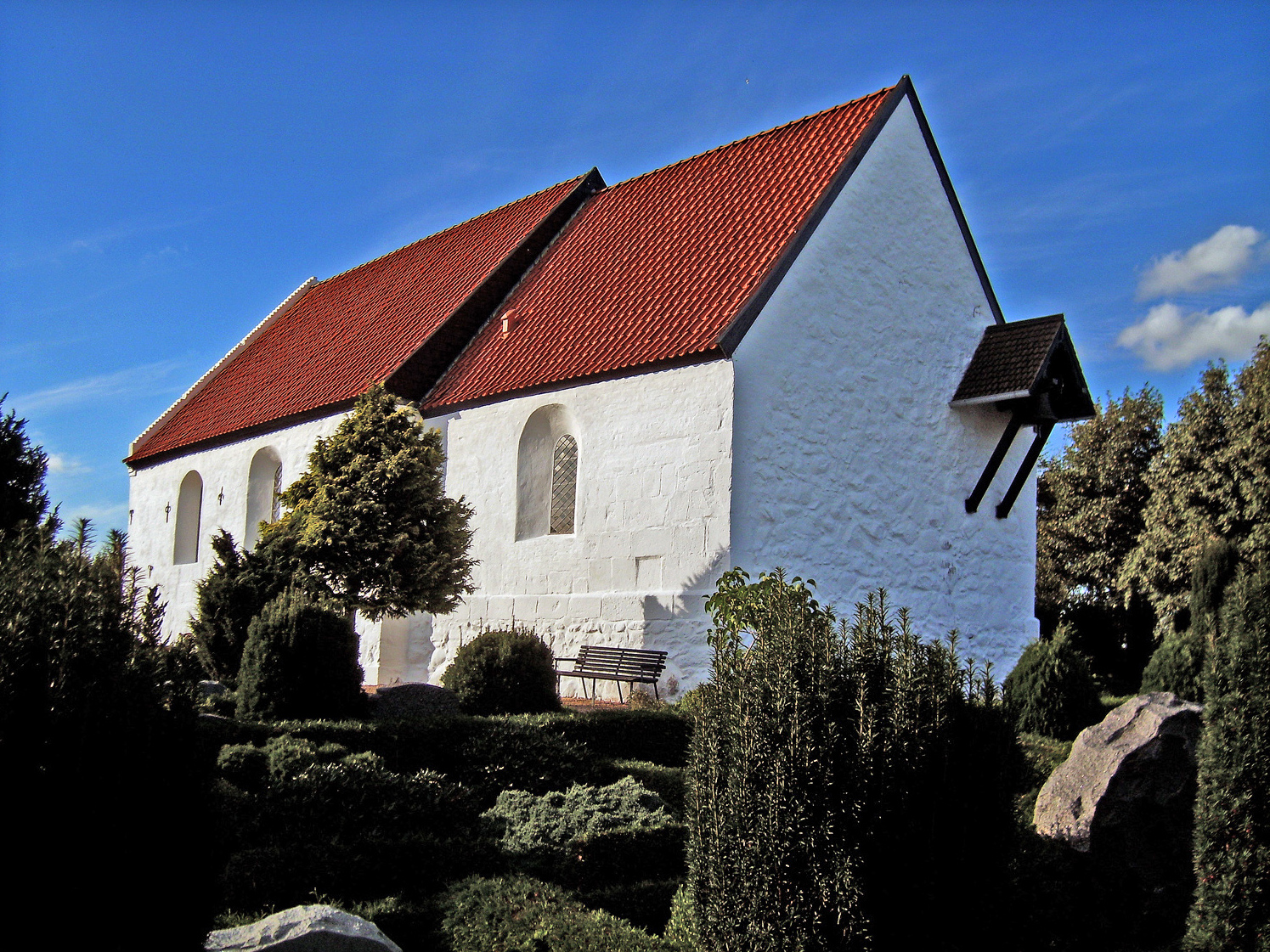 fra sydøst